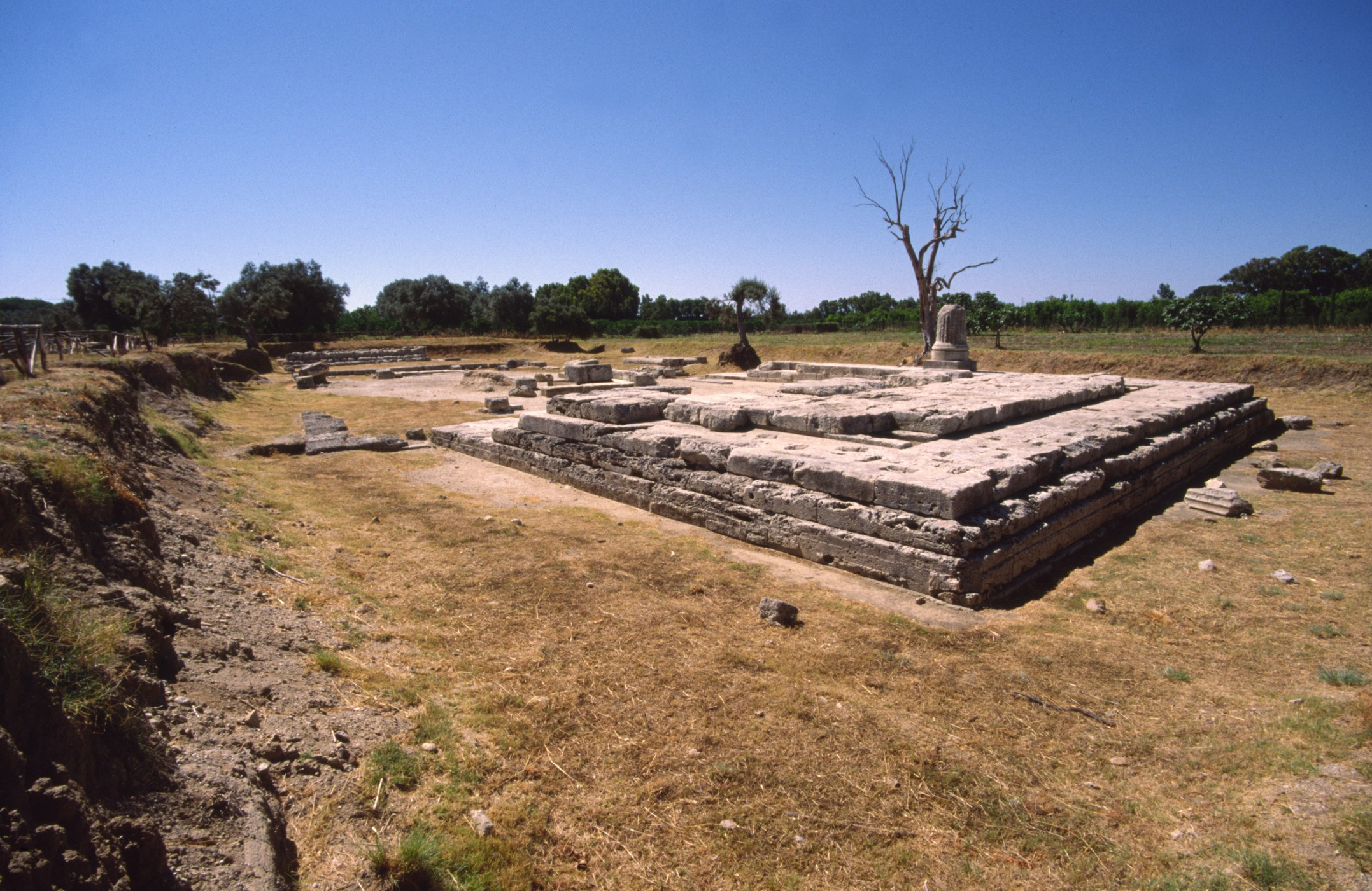 Scavi di Locri Epizefiri. Zona del tempio ionico nel 1996.